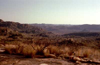 Matopo-Gebirge